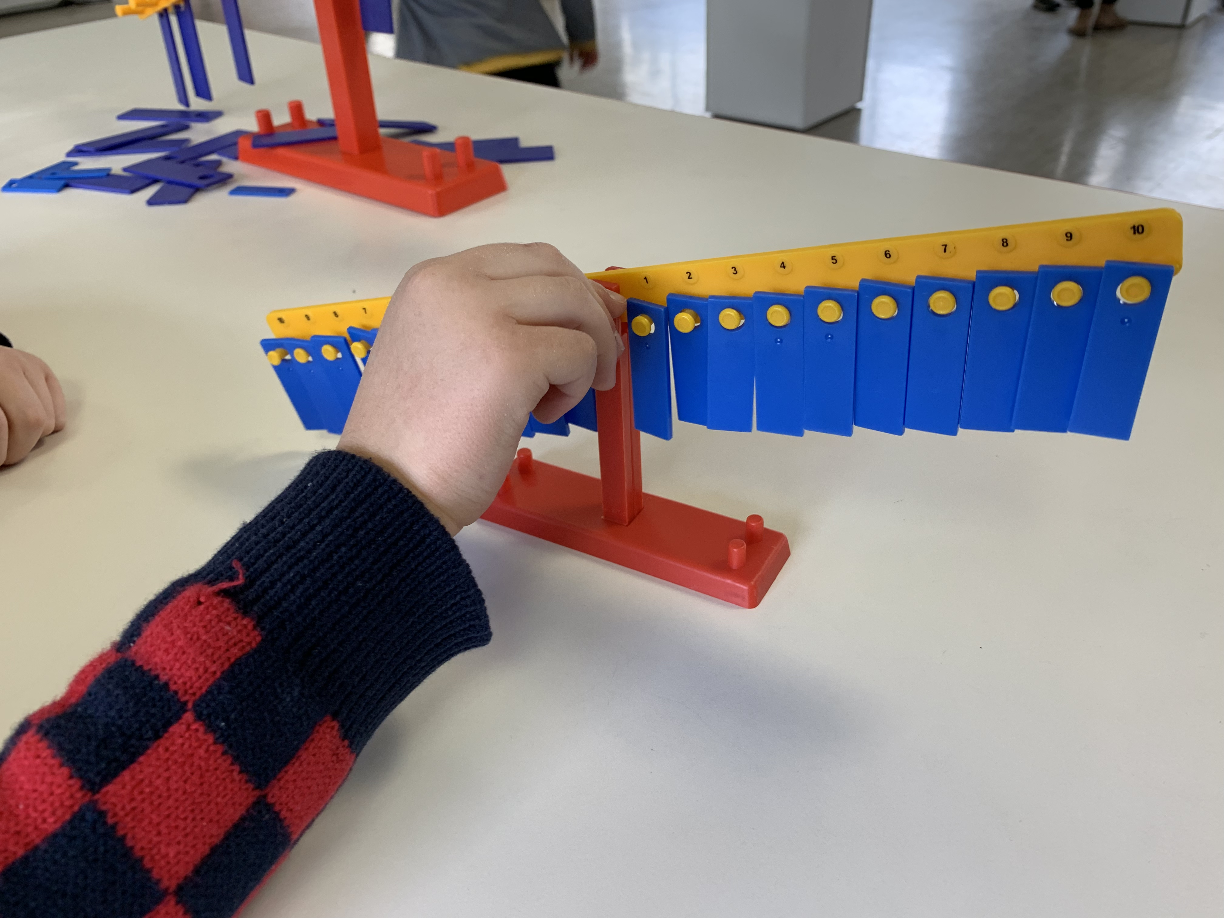 EbulliScience (Vaulx-en-Velin).